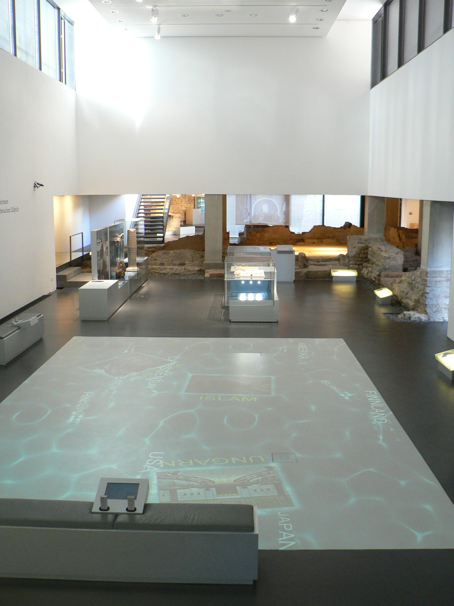 Die moderne Basilika mit der Projektionsfläche